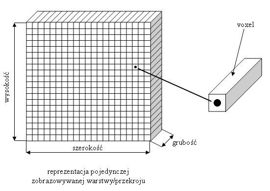 Komputerowa reprezentacja pojedynczej zobrazowywanej warstwy w postaci małych elementów objętości, voxeli.